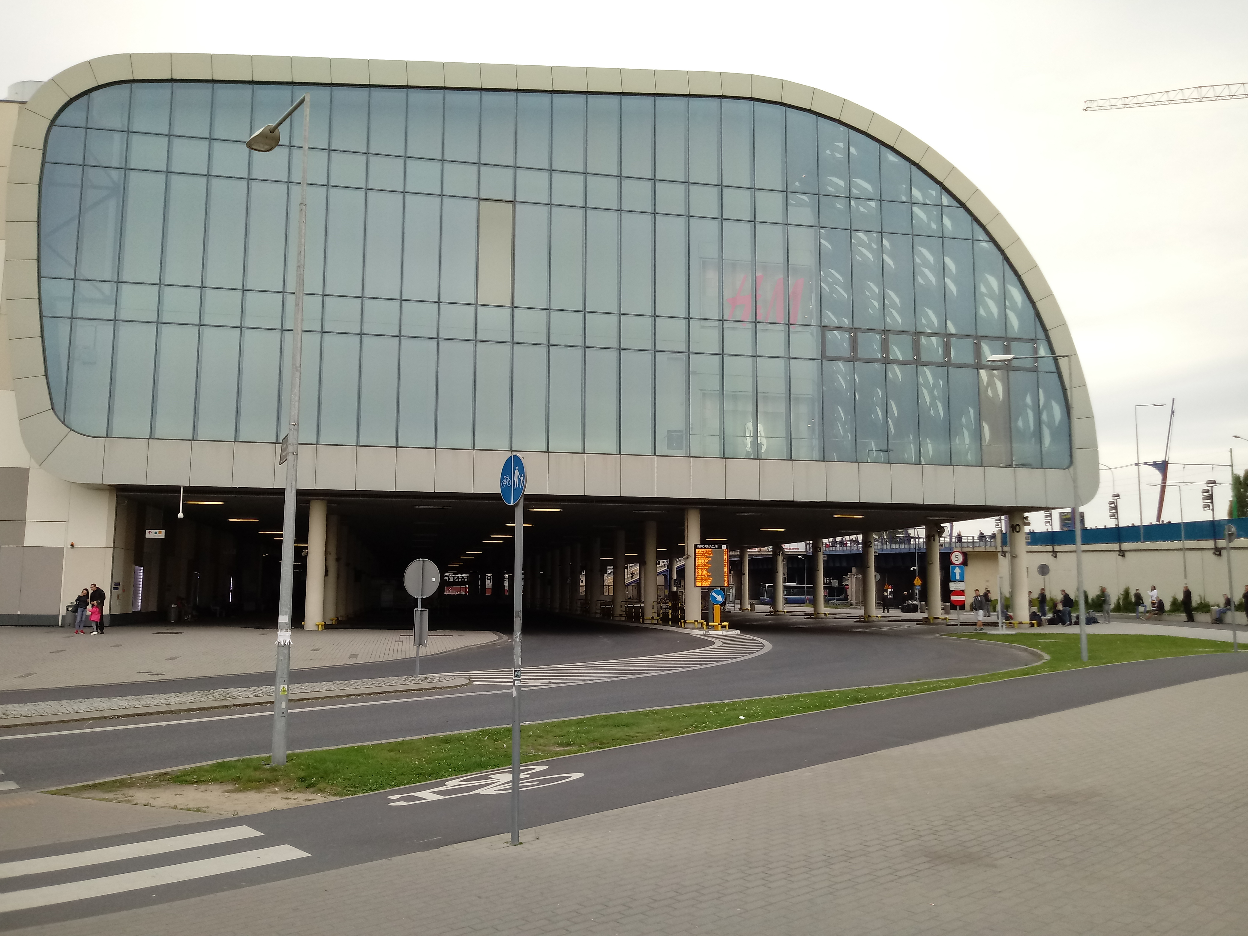 Dworzec autobusowy w Poznaniu, widok na perony